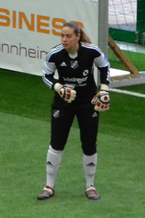 Kristina Kober (SC Sand) beim SAP Frauen-FußballCup 2016